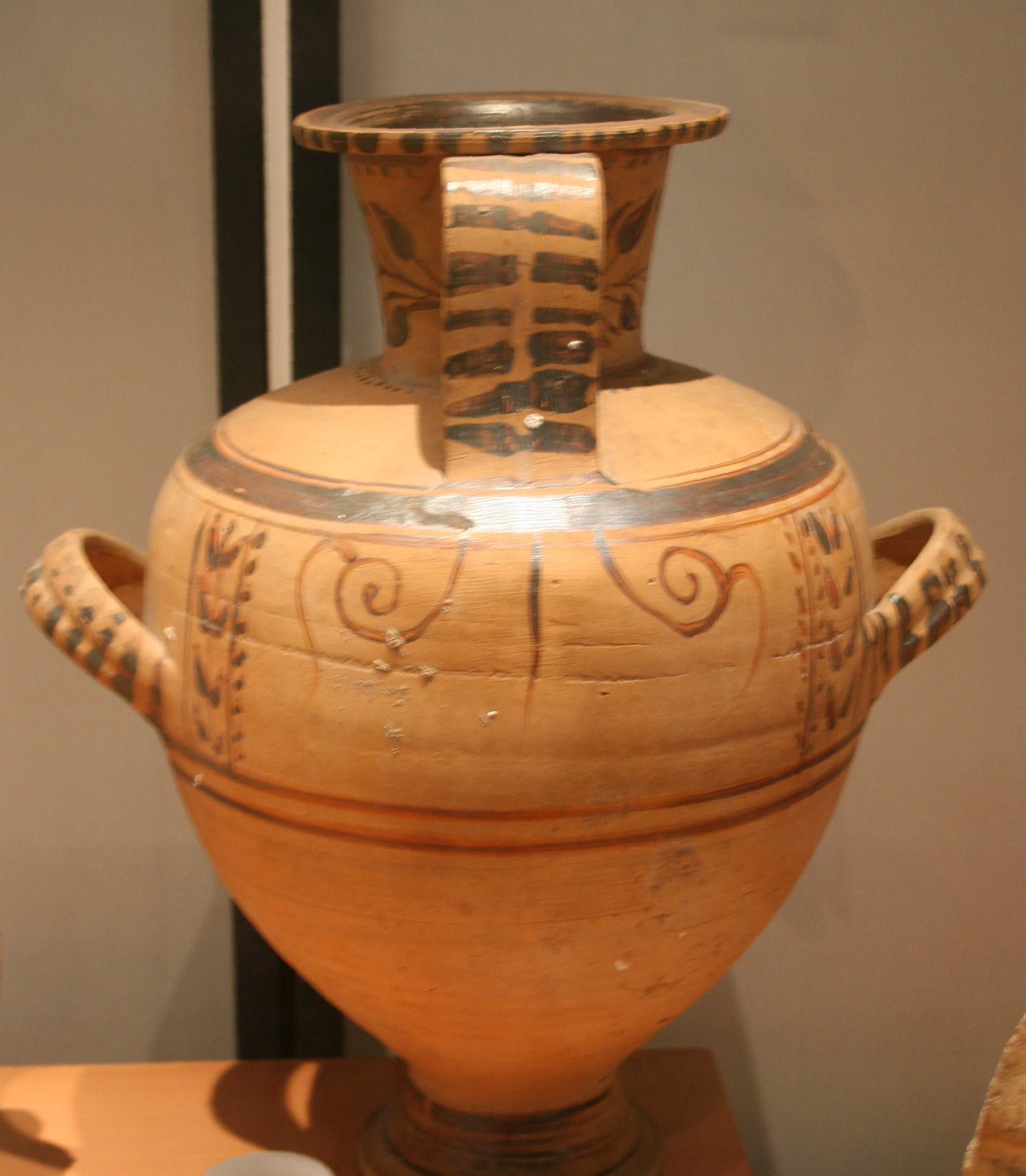 Hydri en provenance de Hadra, une des principales nécropoles d'Alexandrie, située au Sud-Est de cette ville. Cette localité a donné son nom à toute une catégorie d'hydries funéraires peintes. Epoque hellénistique-ptolémaïque, 325-250 av J.C., antiquités classiques du musée d’archéologie méditerranéenne de la vieille charité à Marseille